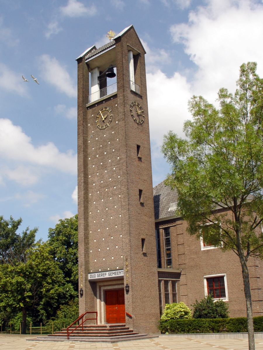 Joachim Boazkerk op Urk